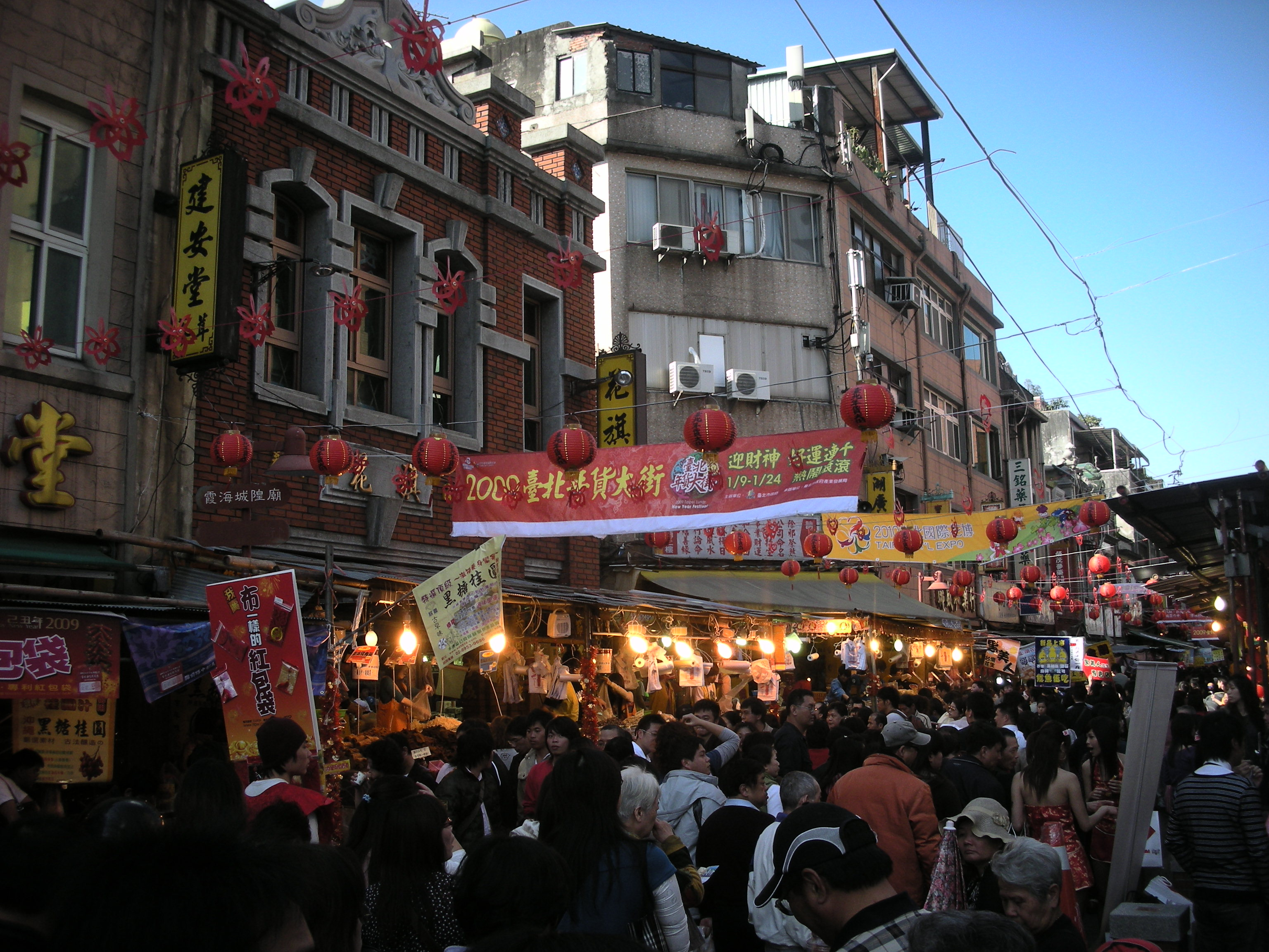 迪化街逛舊街辦年貨